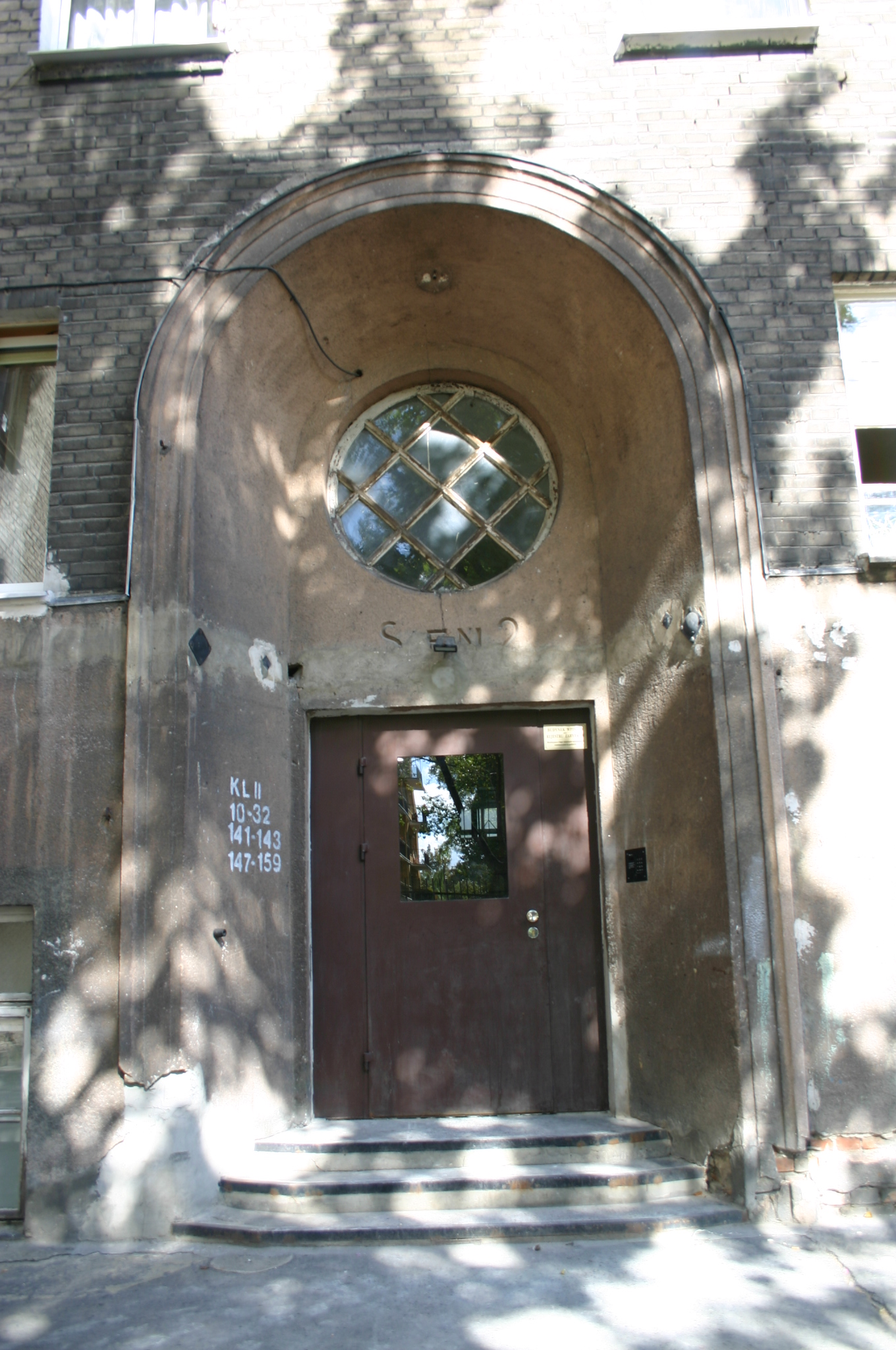 Wejście do sieni od strony podwórza; Dom Fundacji Wawelbergów, 1927-29 Warszawa, ul. Ludwiki 1, Wola